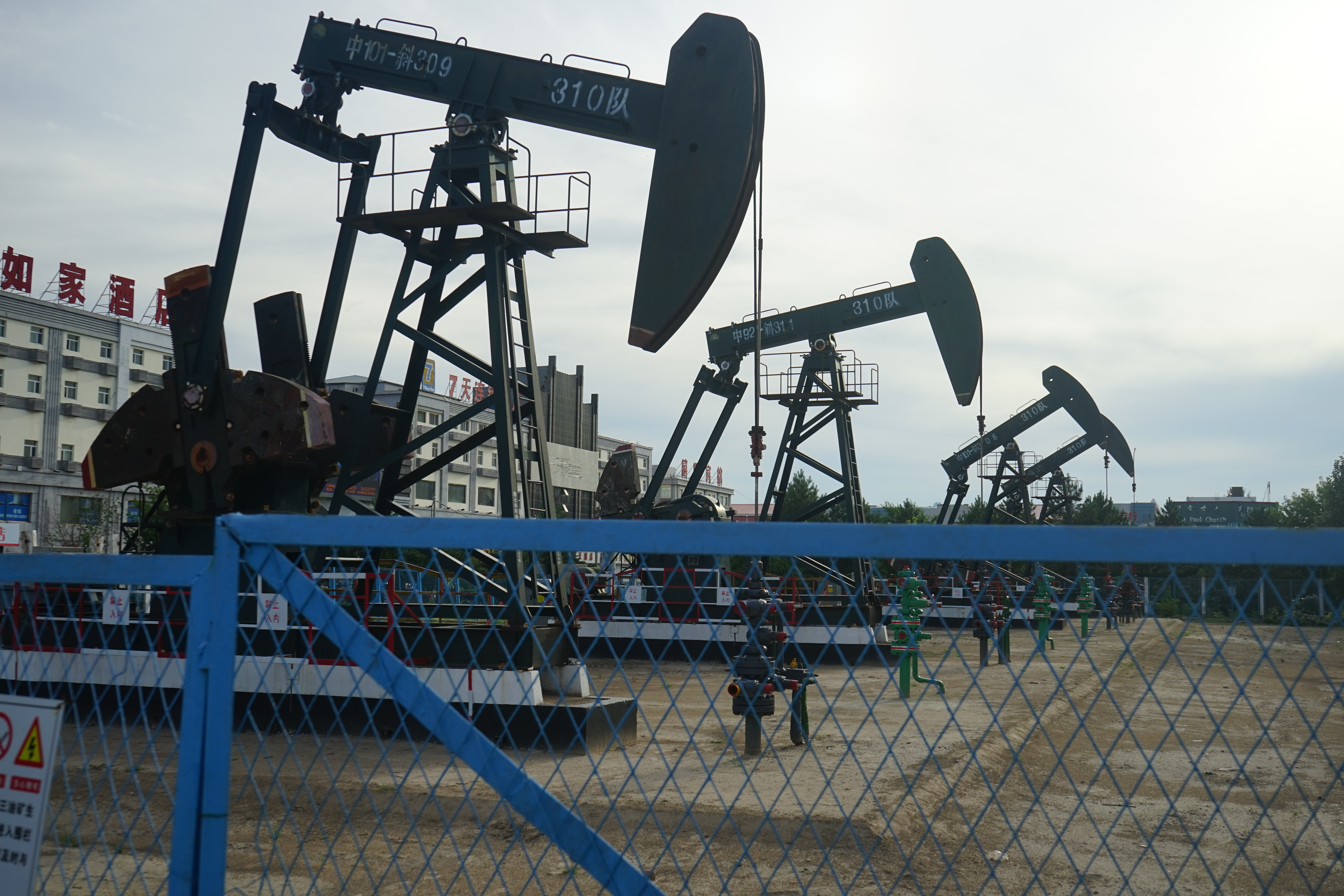 中文（中国大陆）: 大庆的三台抽油机。中原路附近。近圣象地板站。